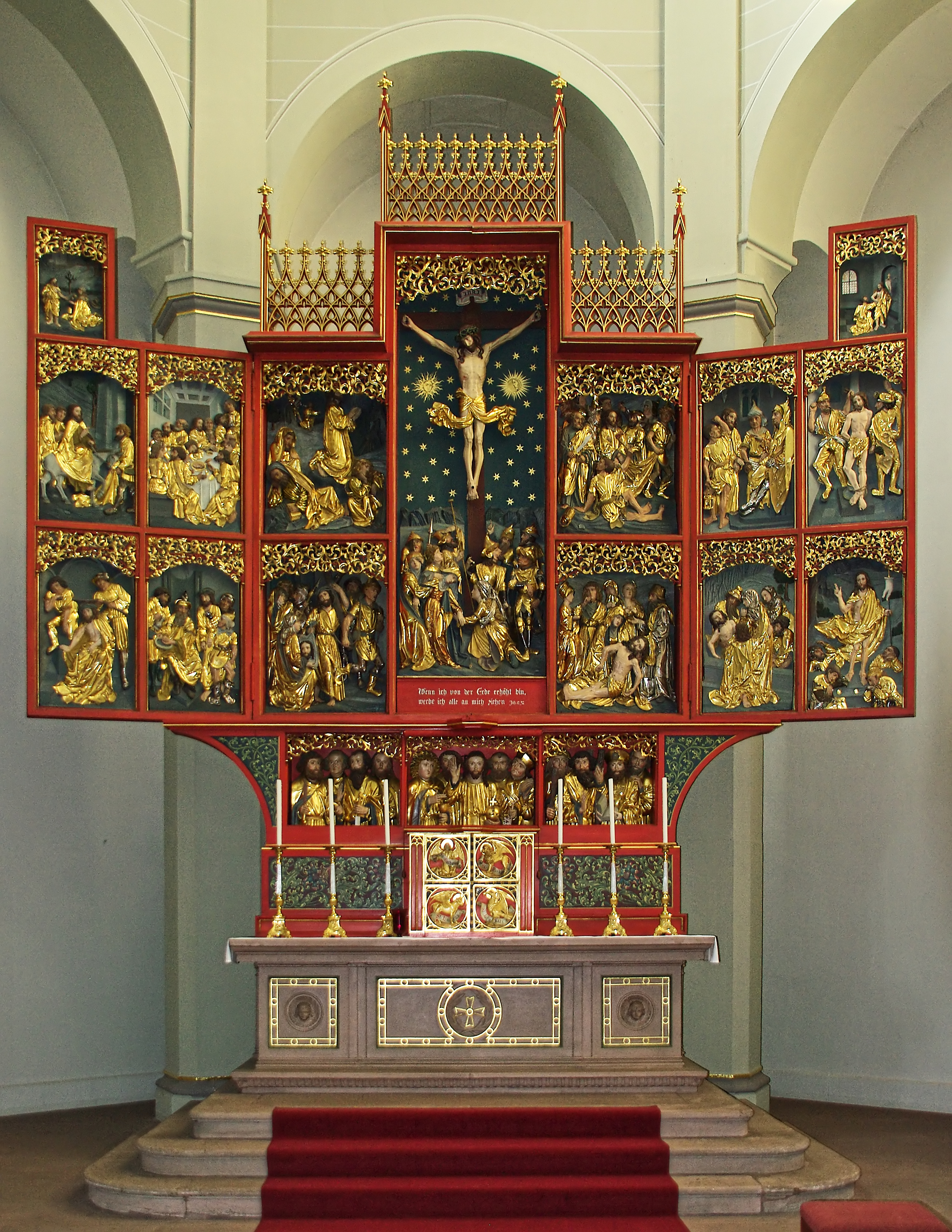 Der Altar in St. Georg